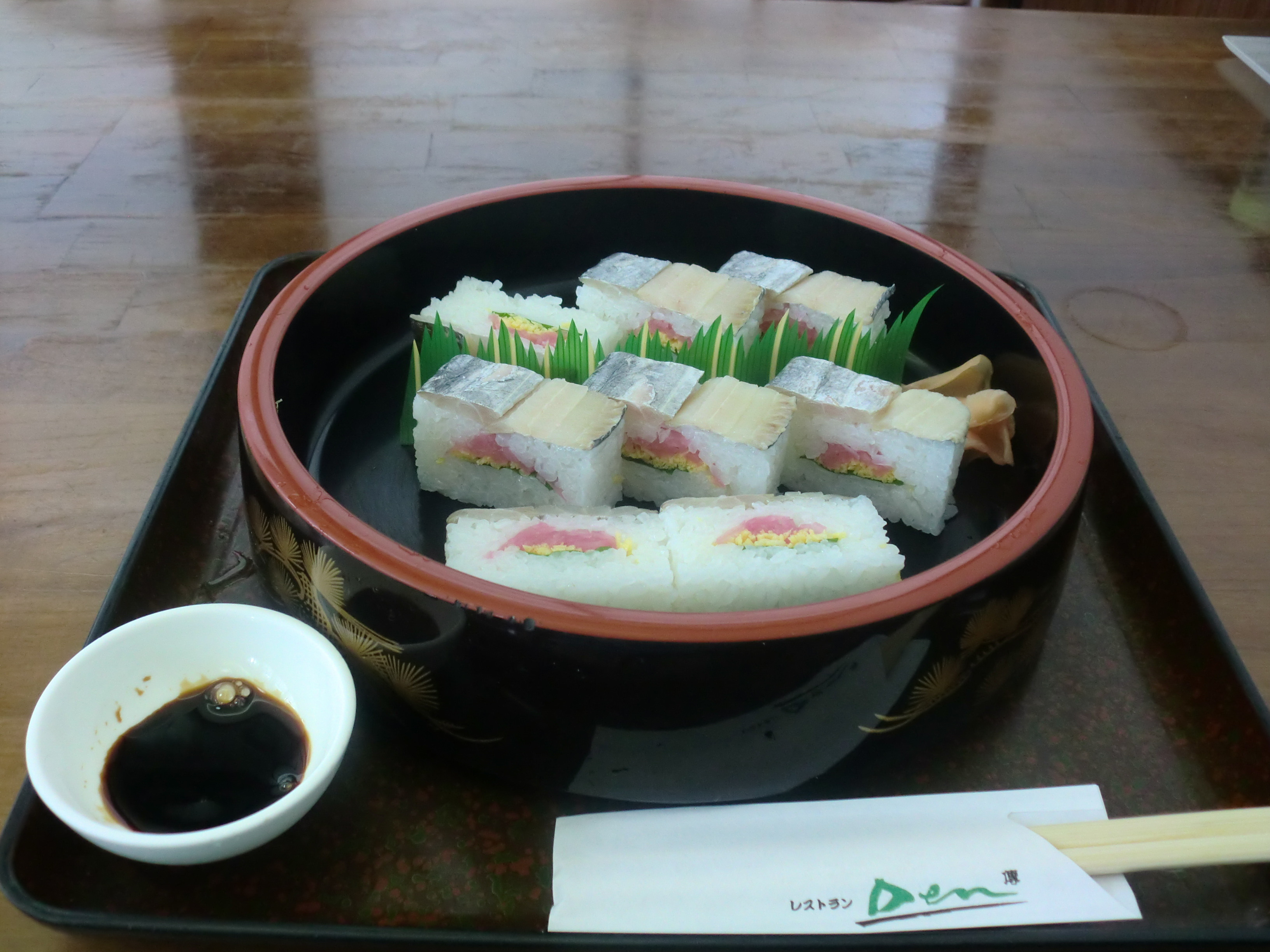 熊本県水俣市のレストラン傳で食べた太刀魚の押し寿司